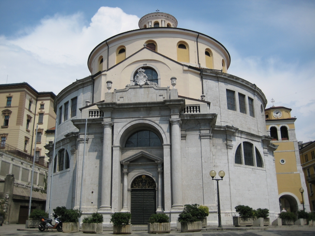 Crkva Sv. Vida, sagrađena 1638. g. U kamenu temeljac isusovci su dali uklesati ime cara, rektora Kolegija, sudaca i rektora Vijeća i ime graditelja Francesca Olivieria, "Taglia Pietra".